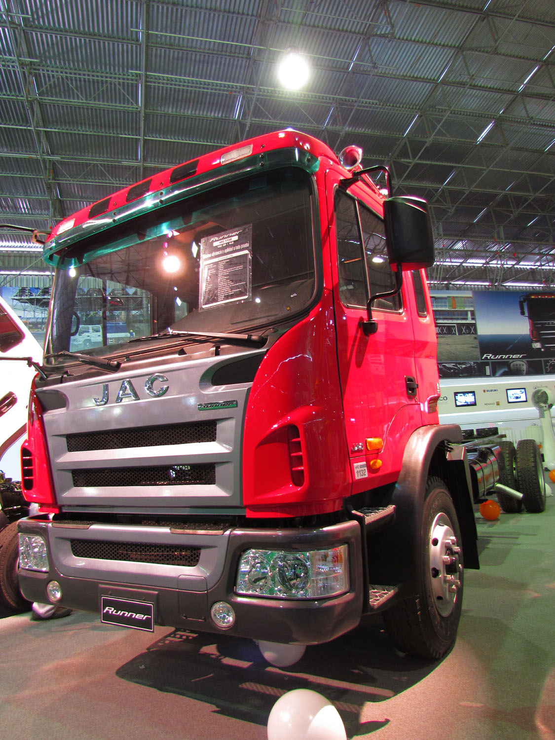 JAC Runner